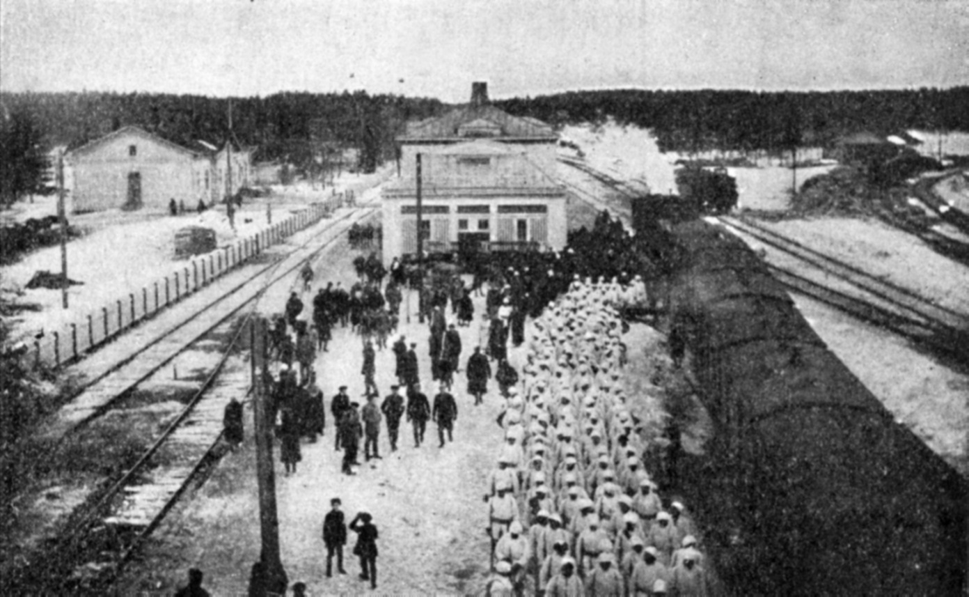 Description